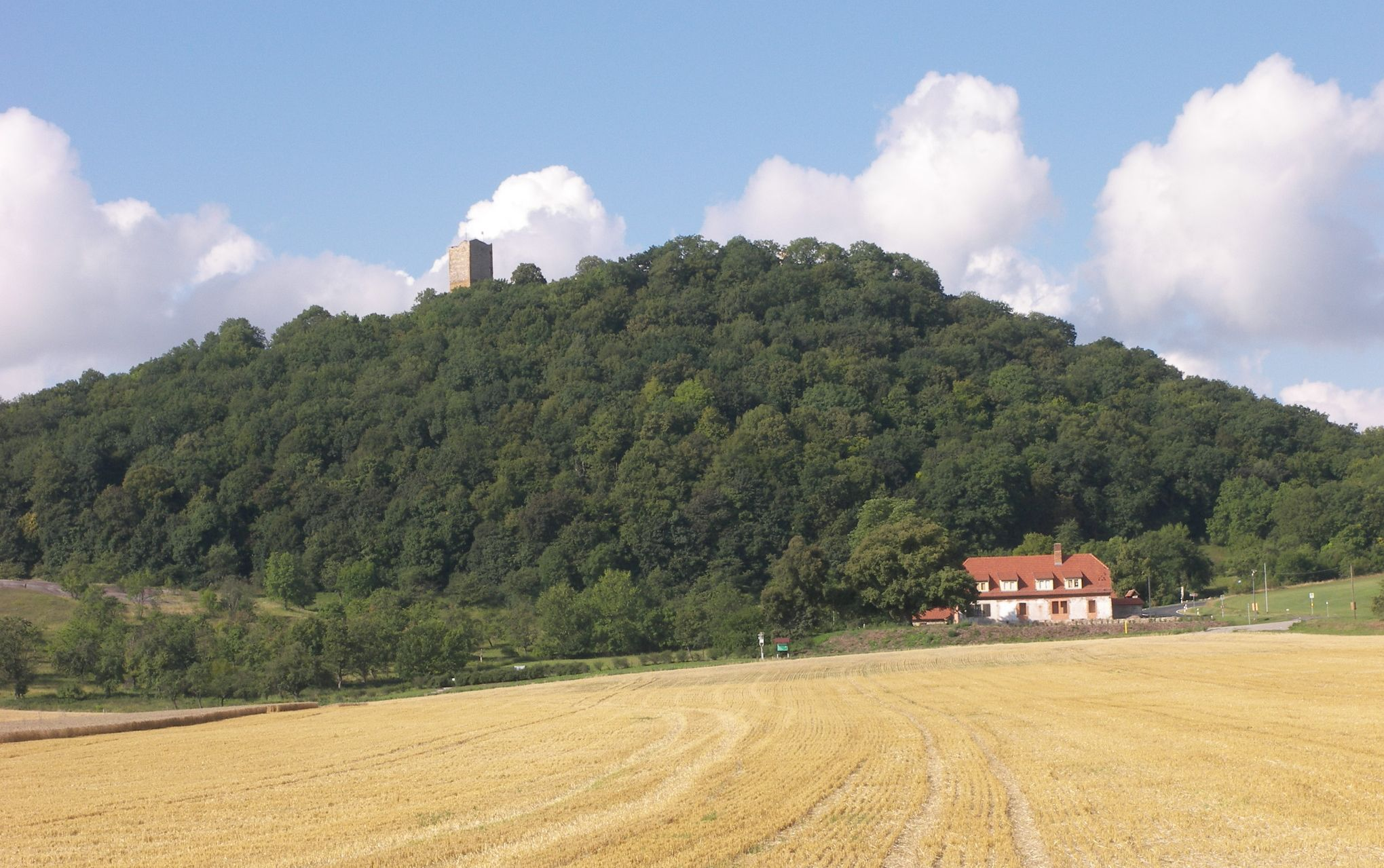 Burg Gleichen aus Osten, am Fuß die Gaststätte Freudenthal